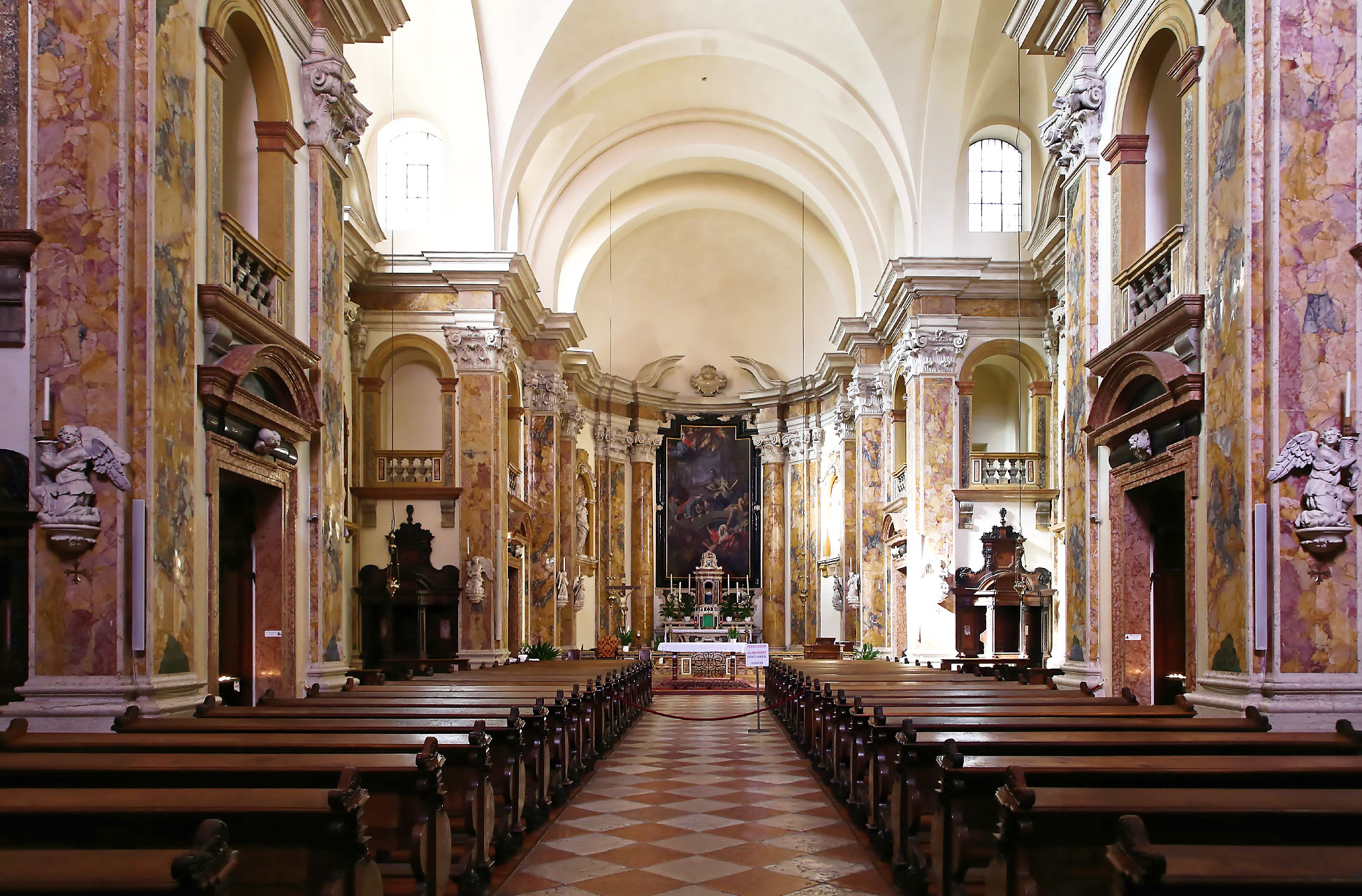 Totale von weit hinten aufgenommen, Querformat